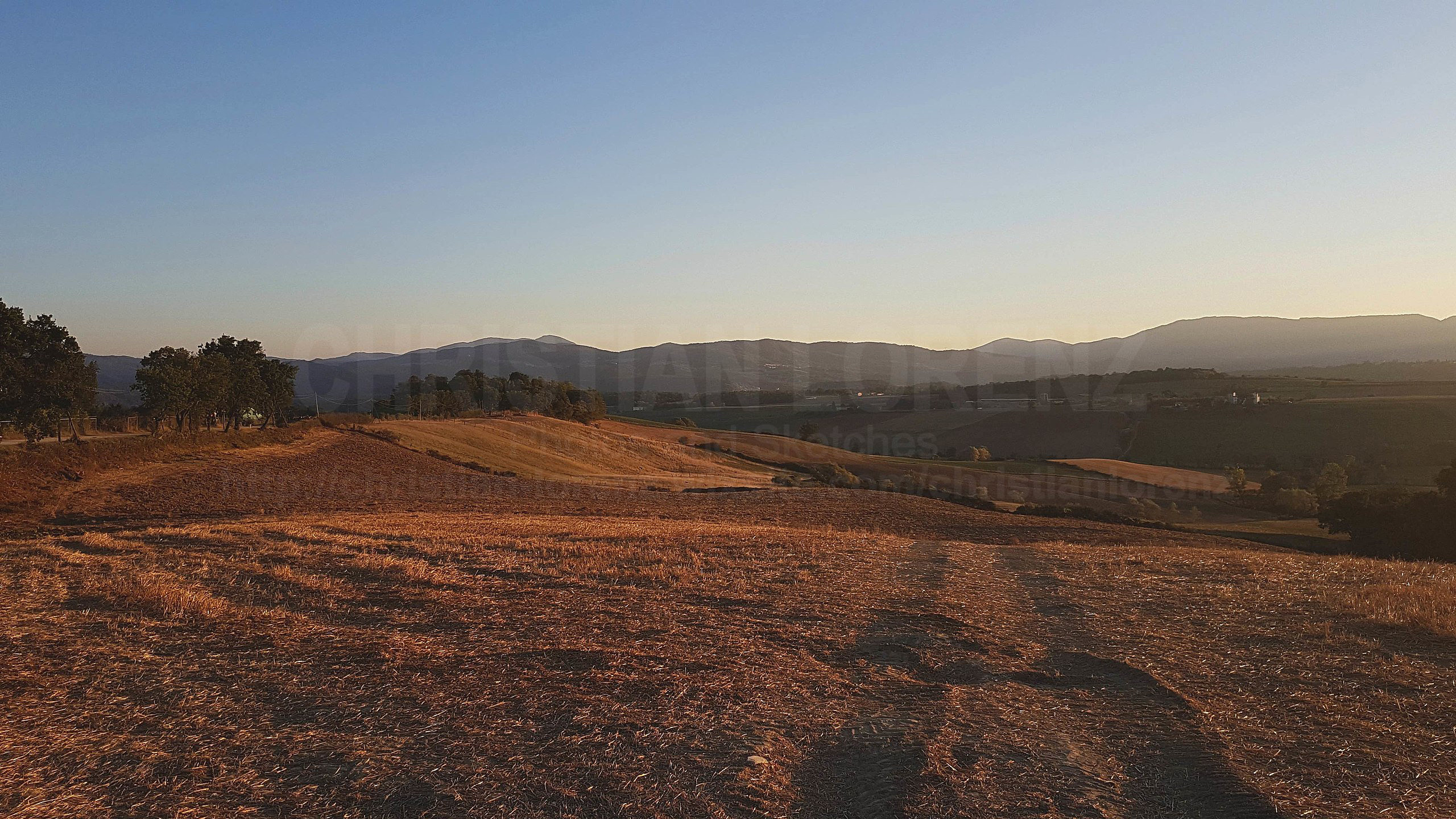 Paesaggio mugellano in estate, località Gabbiano (Scarperia).